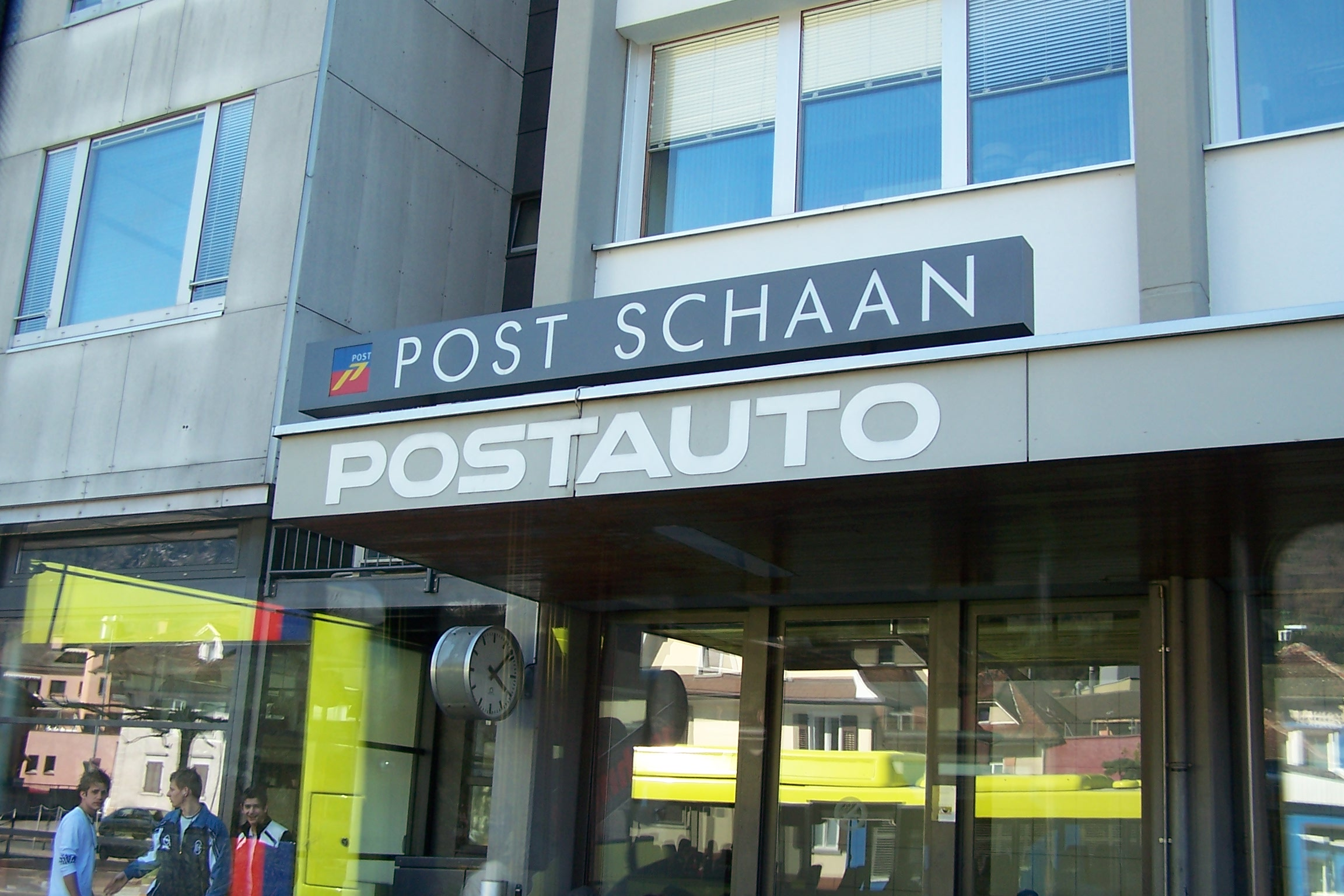 Post office in Schaan, Liechtenstein